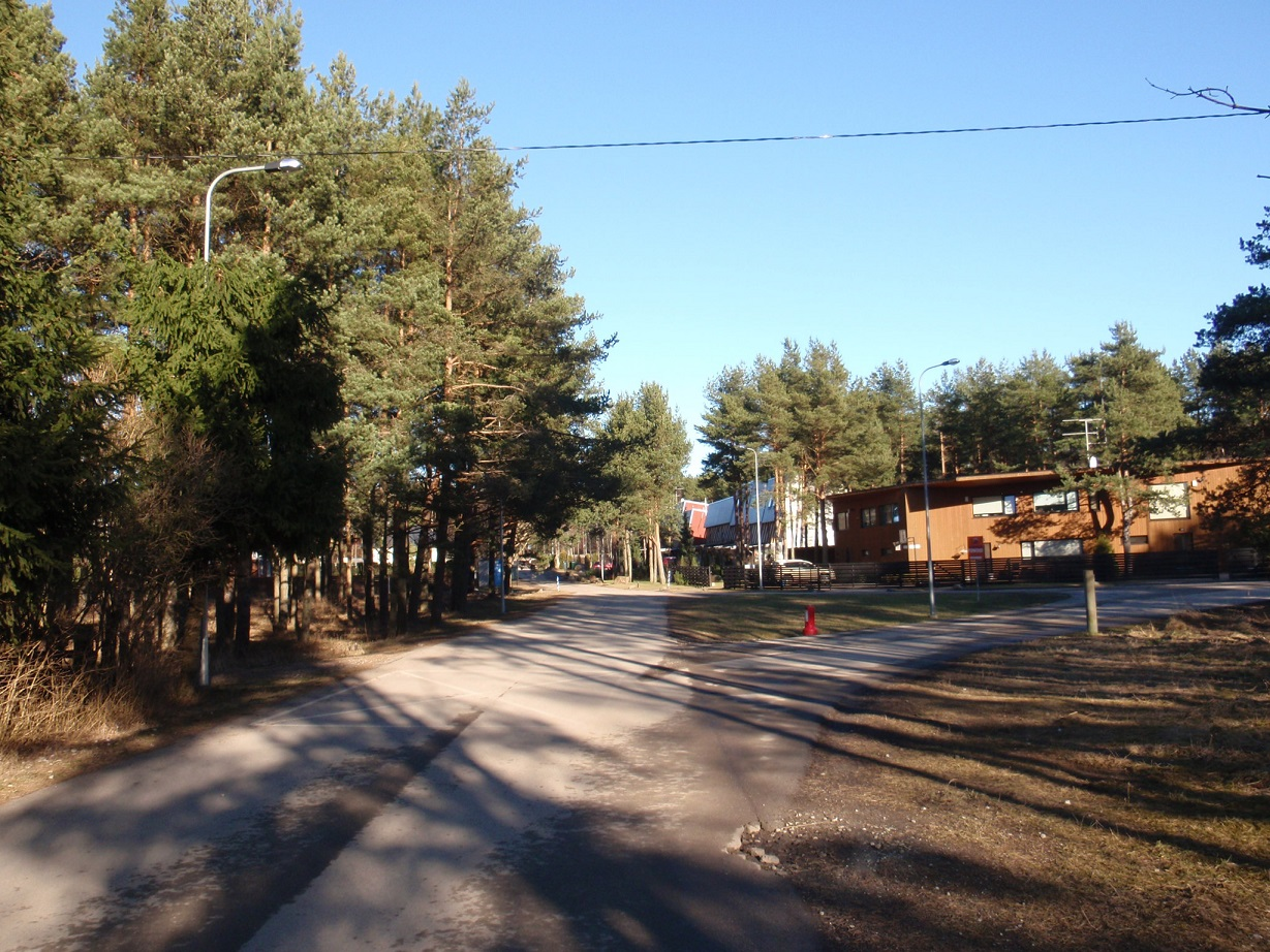 Kõlviku tee